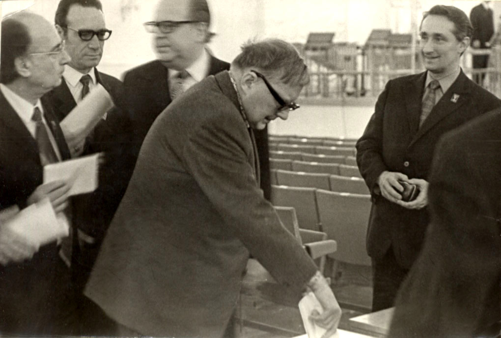 Шостакович Дмитрий Дмитриевич принимает участие в тайном голосовании за новый состав правления на 5-ом Всесоюзном сьезде Союза композиторов СССР в 1974 году в зале Дома союзов.